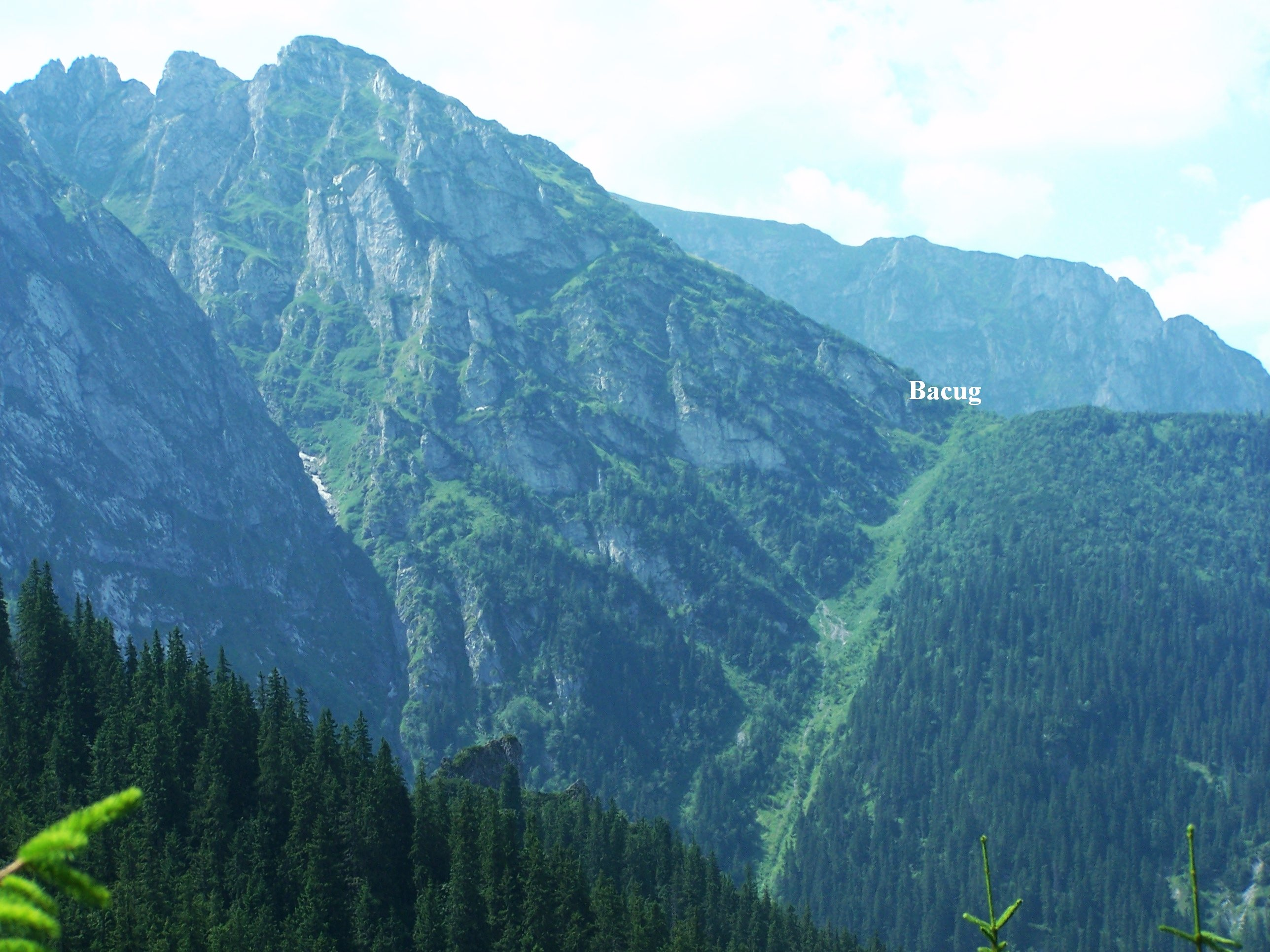 Mały Giewont, przełęcz Bacug